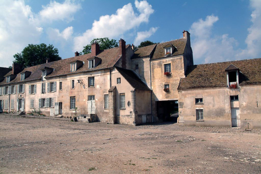 Photo représentant la façade est de la Ferme de Gally aujourd'hui.